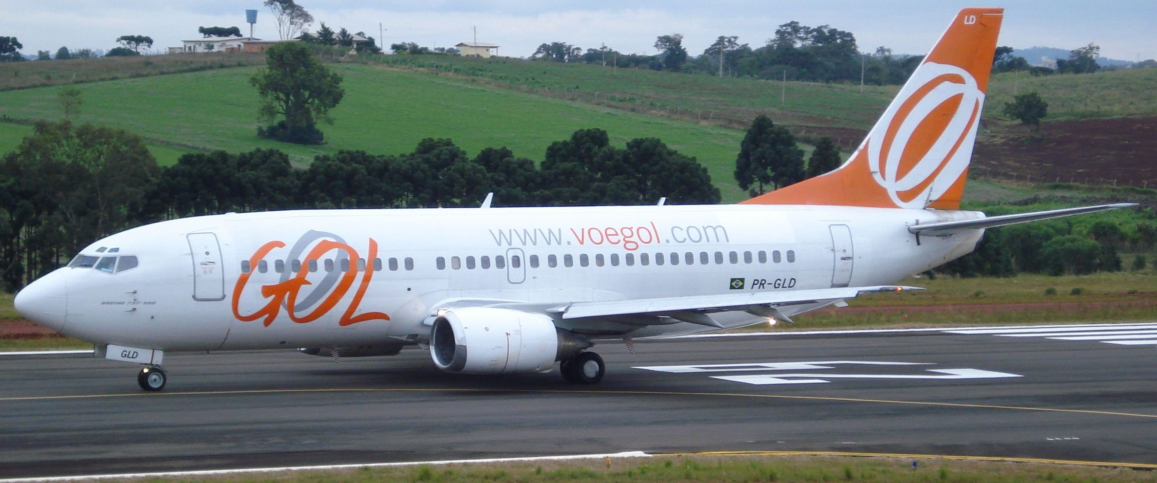 Aeropoto de Chapecó